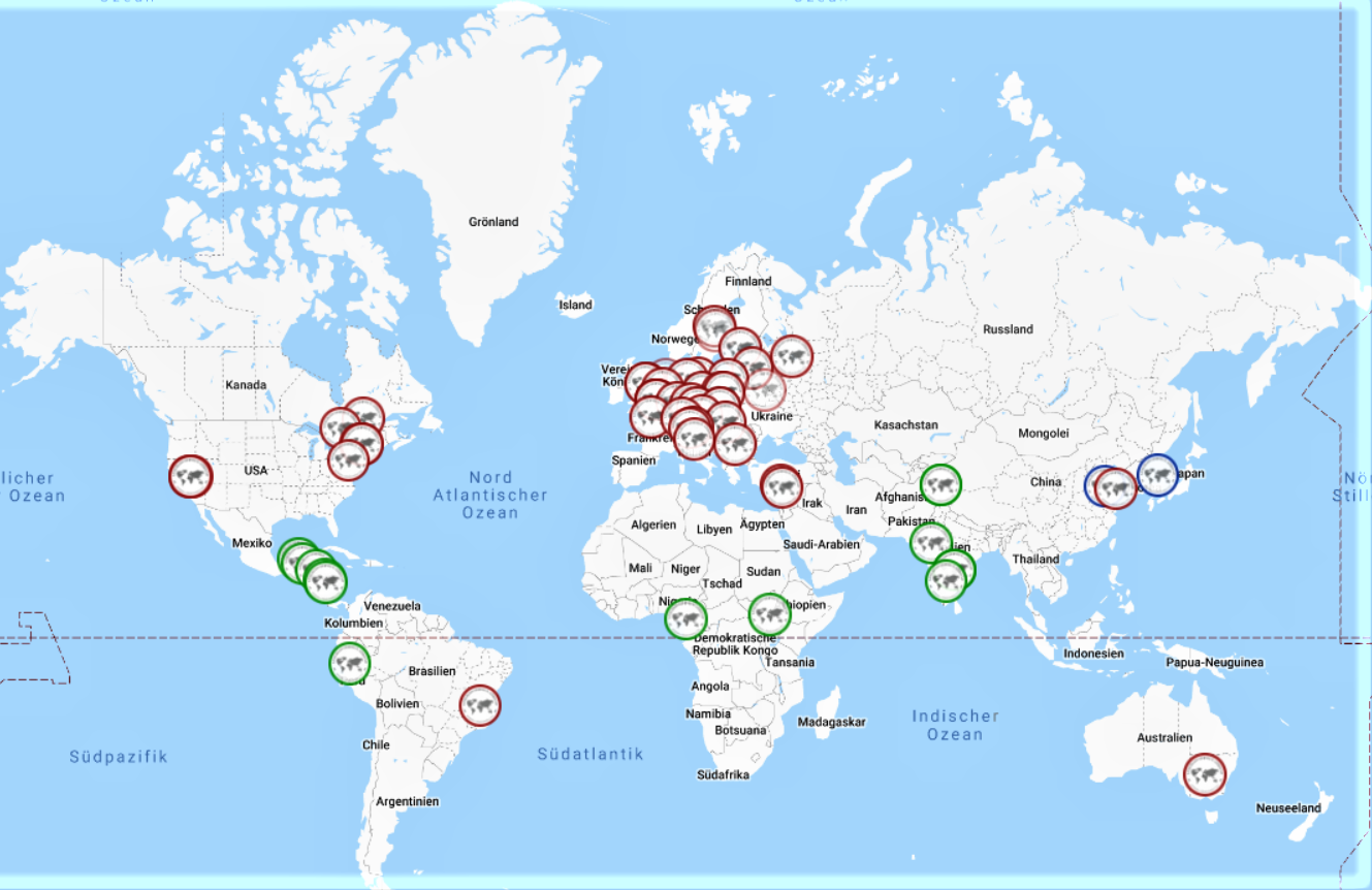 Einsatzstellen Verein Österreichischer Auslandsdienst